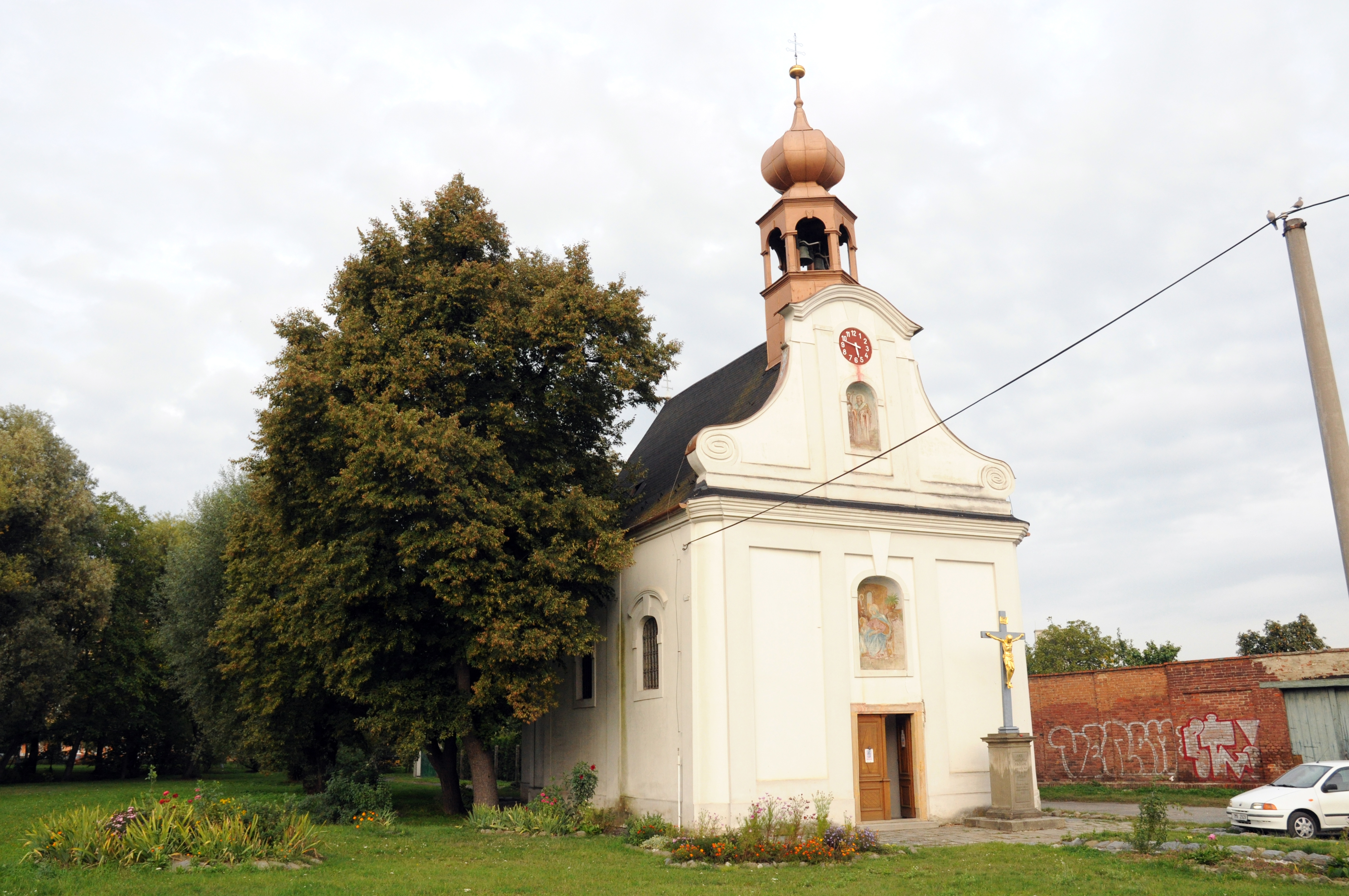 Kaple sv. Anny (Prostějov), Anenská, Prostějov